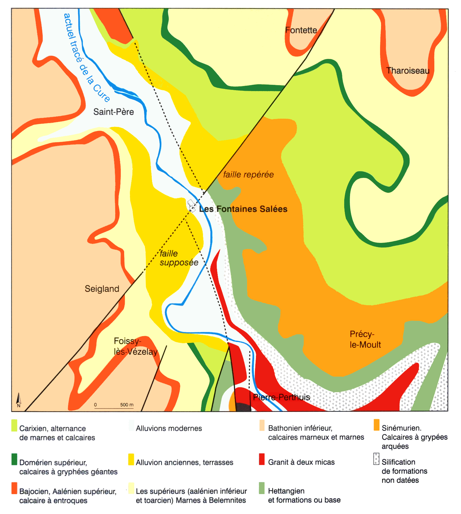 Carte géologique de l'environnement des fontaines salées. Photo retouchée d'un panneau explicatif sur place.